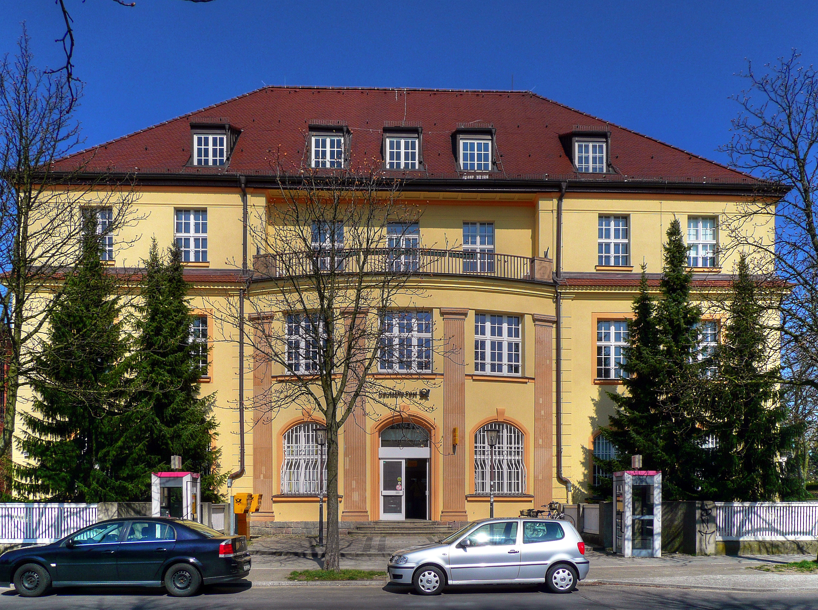 Postamt in Berlin-Dahlem, Königin-Luise-Straße 31; geschlossen Mai 2009